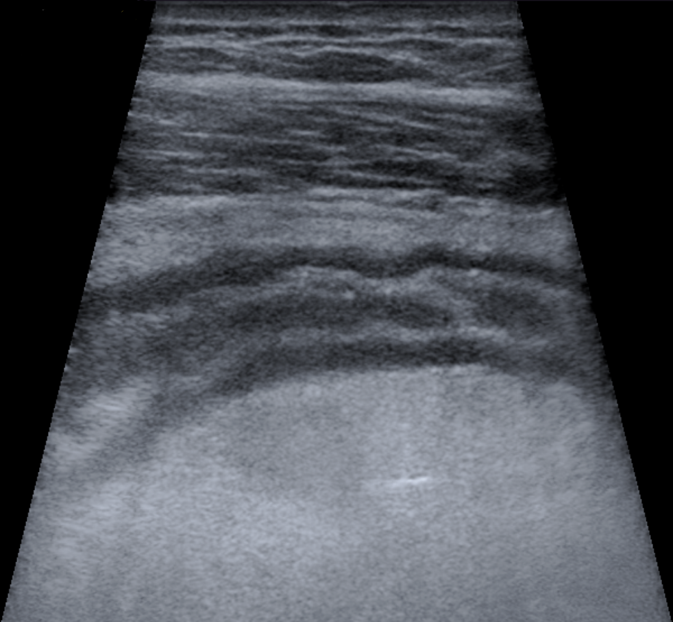 Sigmadivertikulitis in der Sonographie. Man erkennt die langstreckige Wandverdickung.